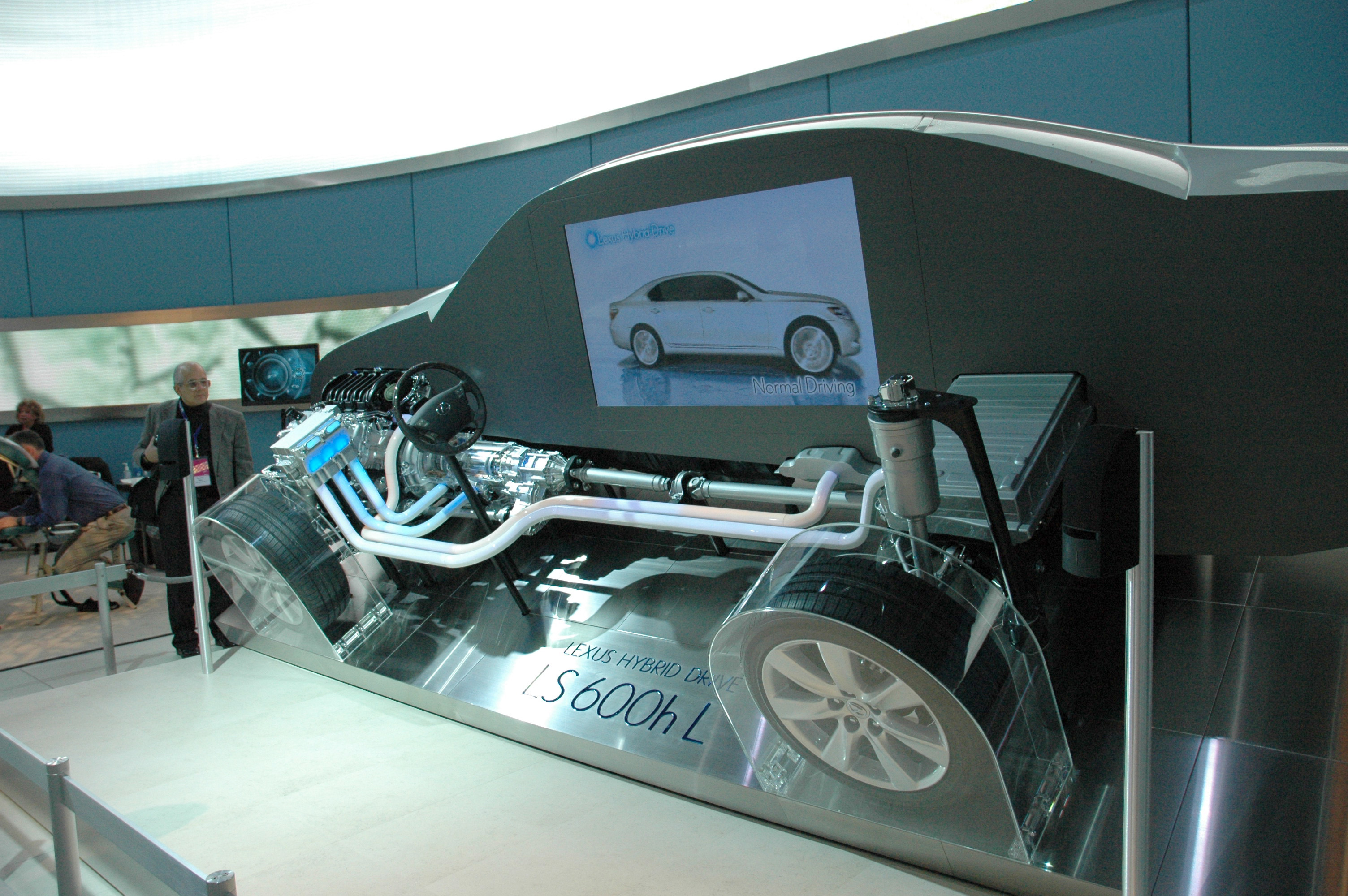 Lexus LS hybrid cutaway